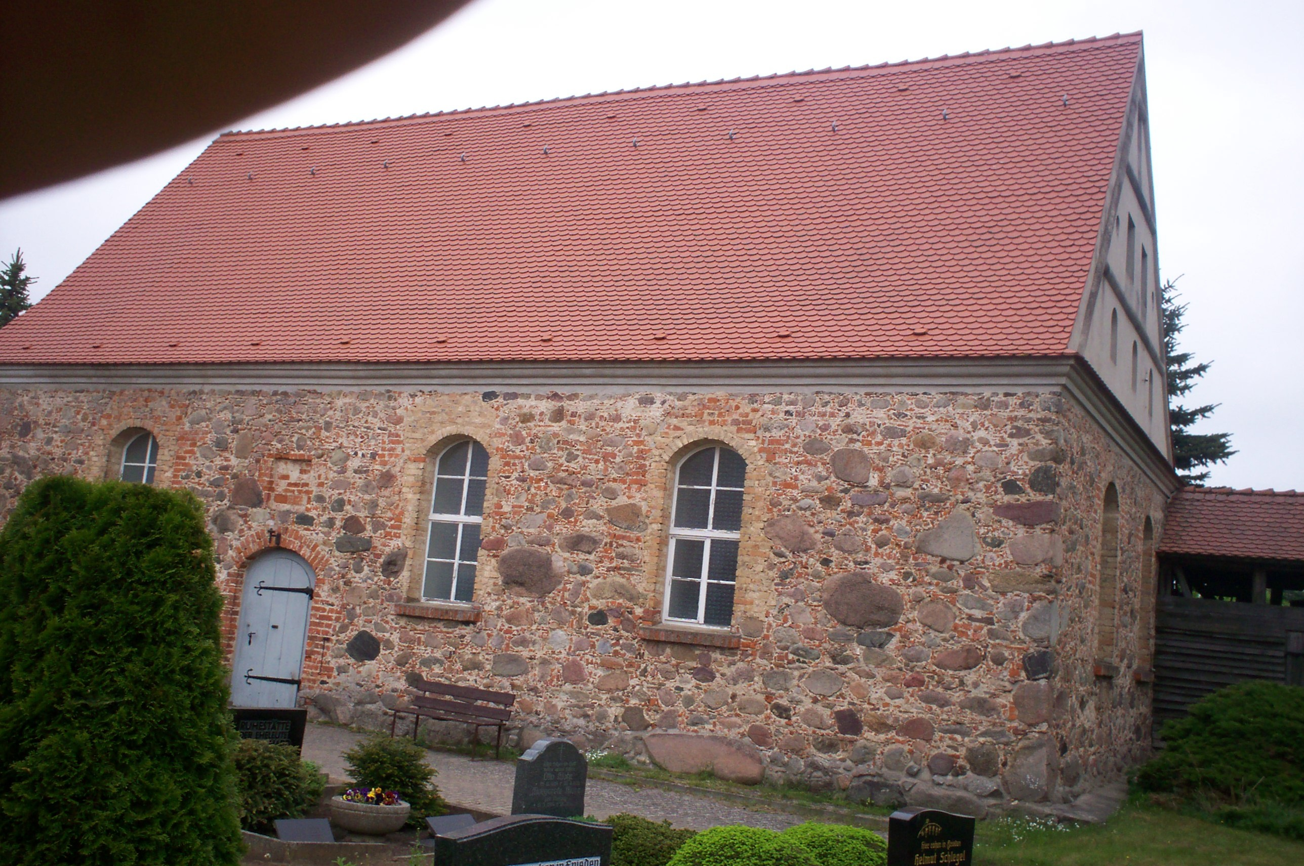 Banzendorf Nr. 71, Dorfkirche, Südseite